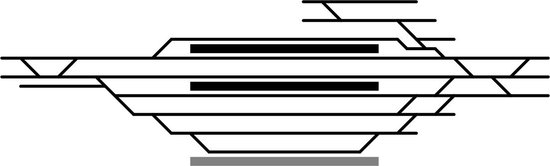 臺鐵樹林車站軌道圖，使用 Microsoft Visio 繪製。